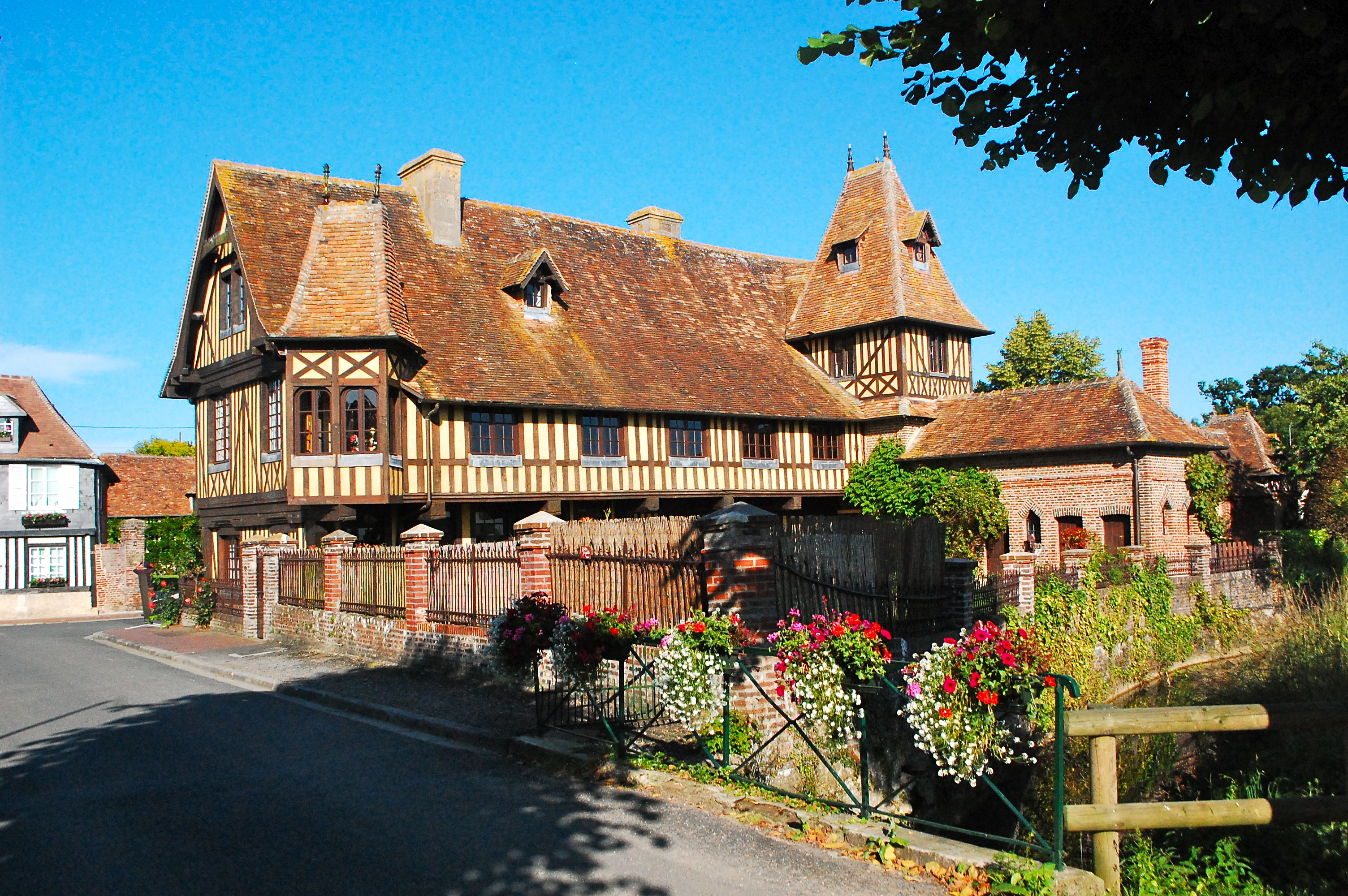 Manoir de Beuvron-en-Auge .